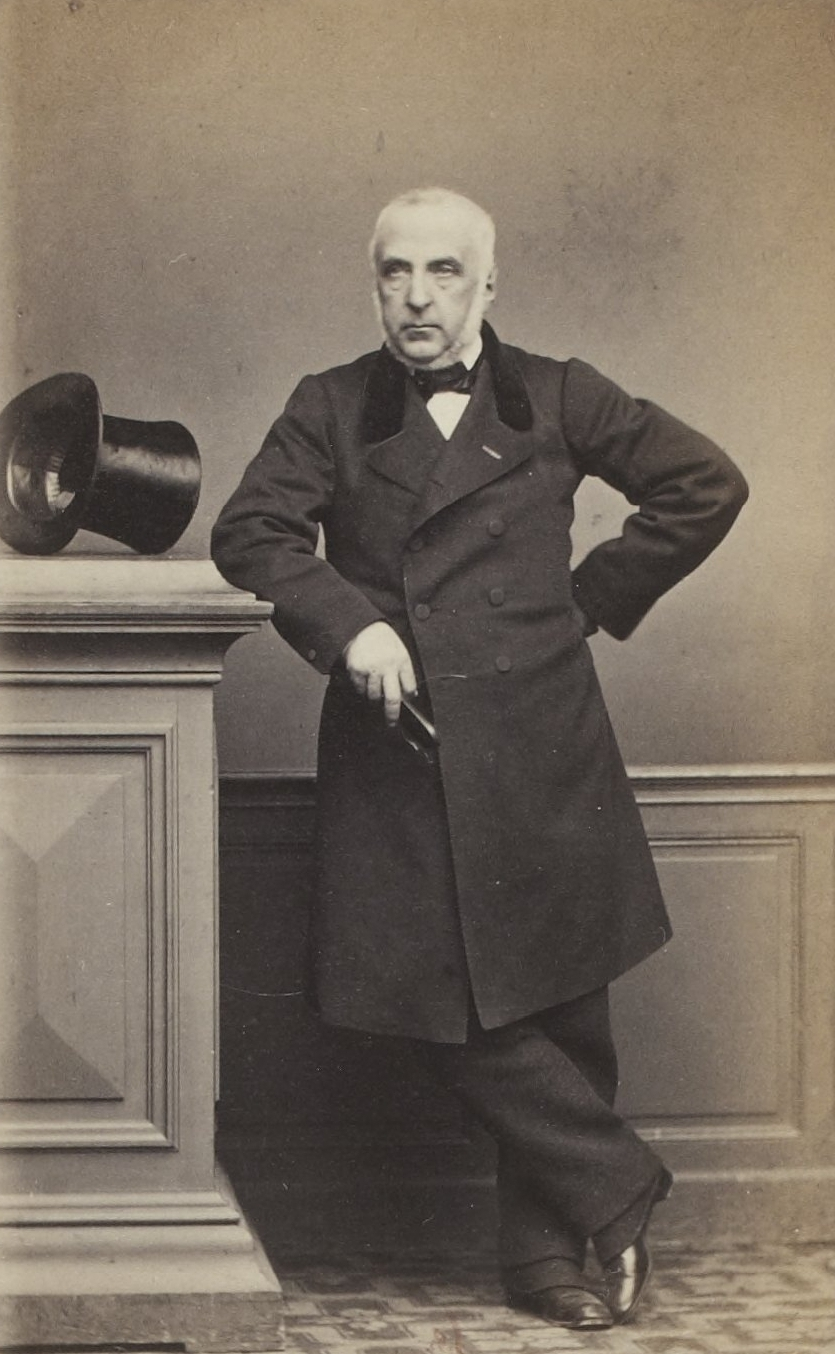 Album des députés au Corps législatif entre 1852-1857.